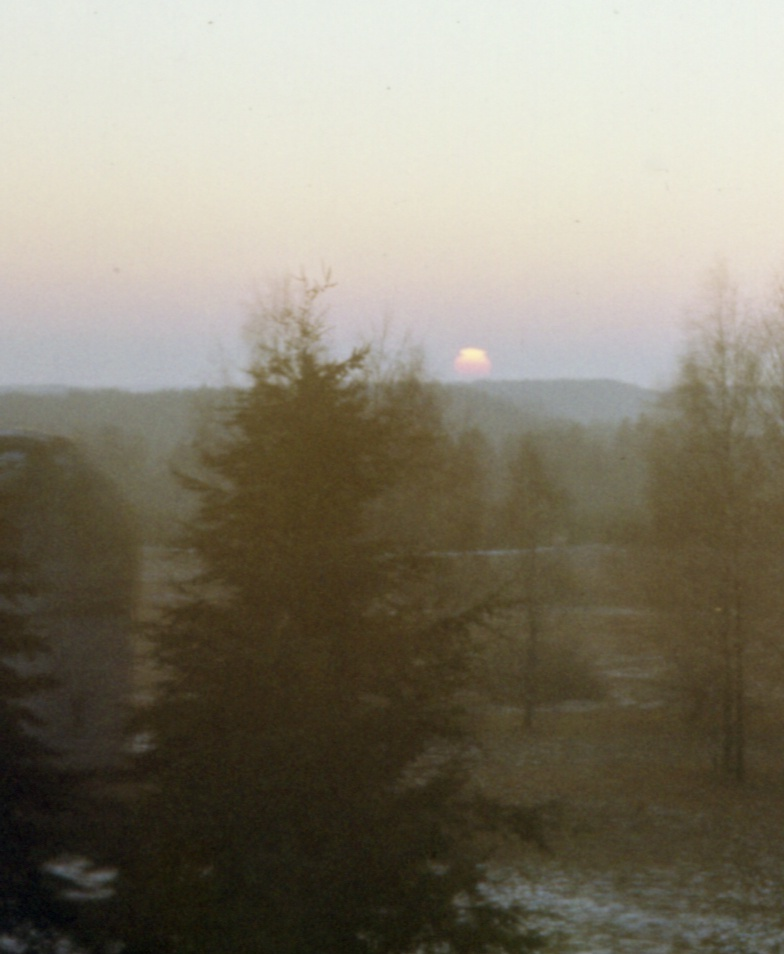 Päikeseloojang.